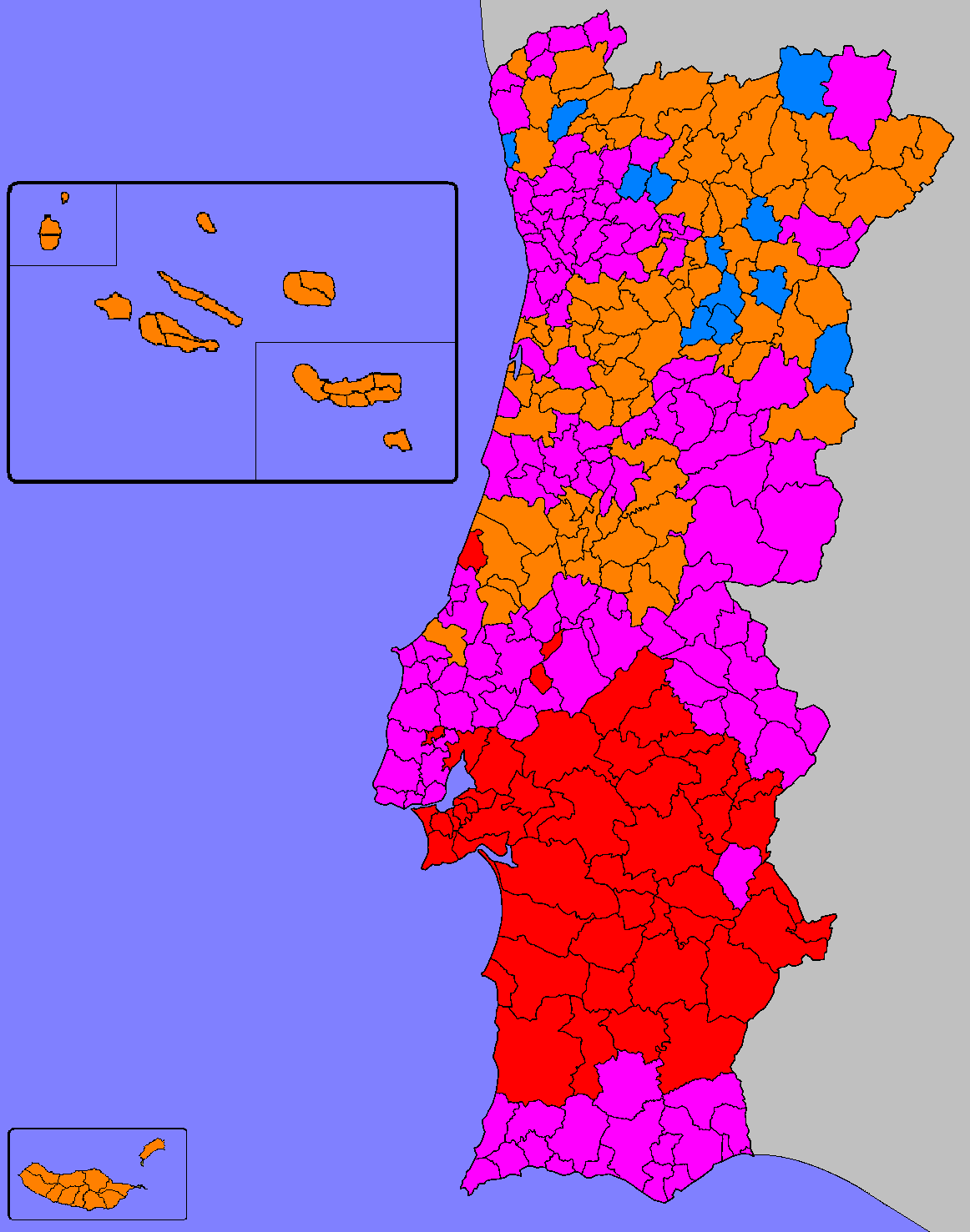 Mapa ilustrativo do partido mais votado por Concelho